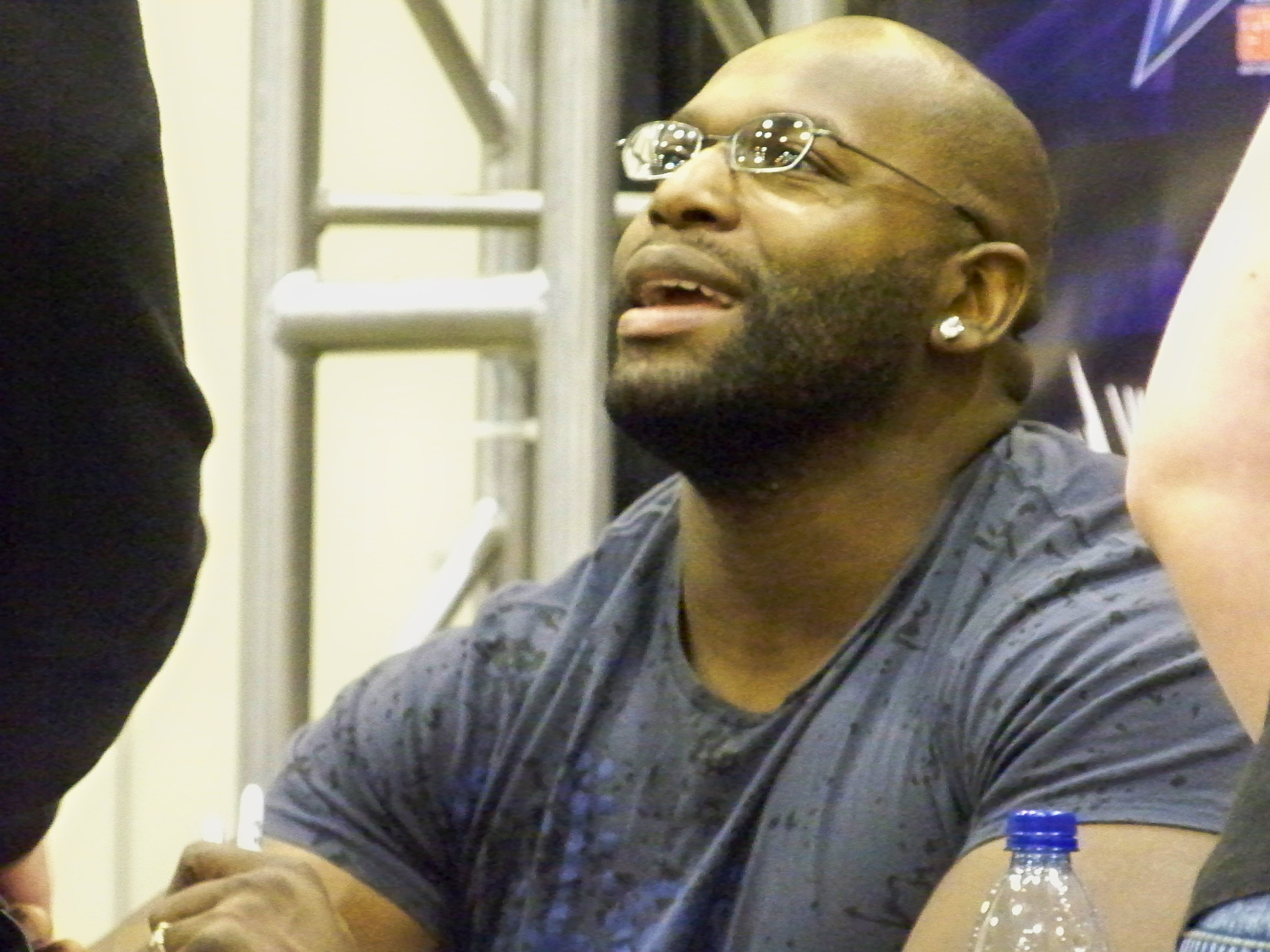 Vraiment une bete en vrai